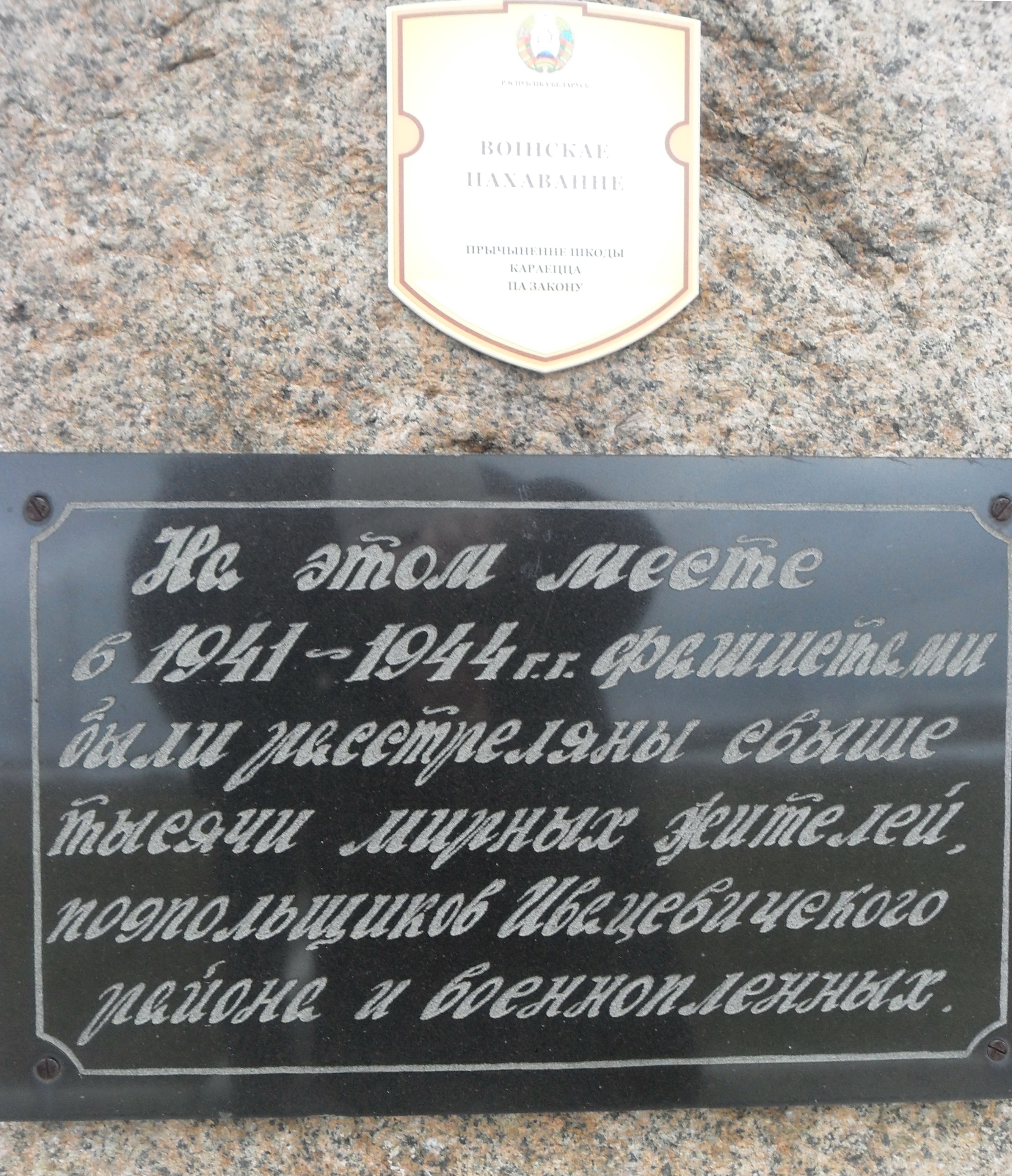 Надпись на валуне-памятнике на месте массового убийства более 1000 мирных жителей (в основном, евреев) города Ивацевичи Брестской области Беларуси во время Холокоста.